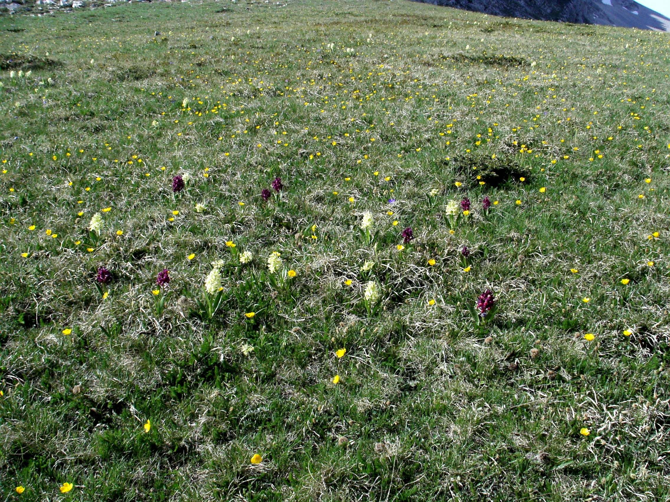 Mimestone Grasses, Hauts Plateaux du Vercors (France)